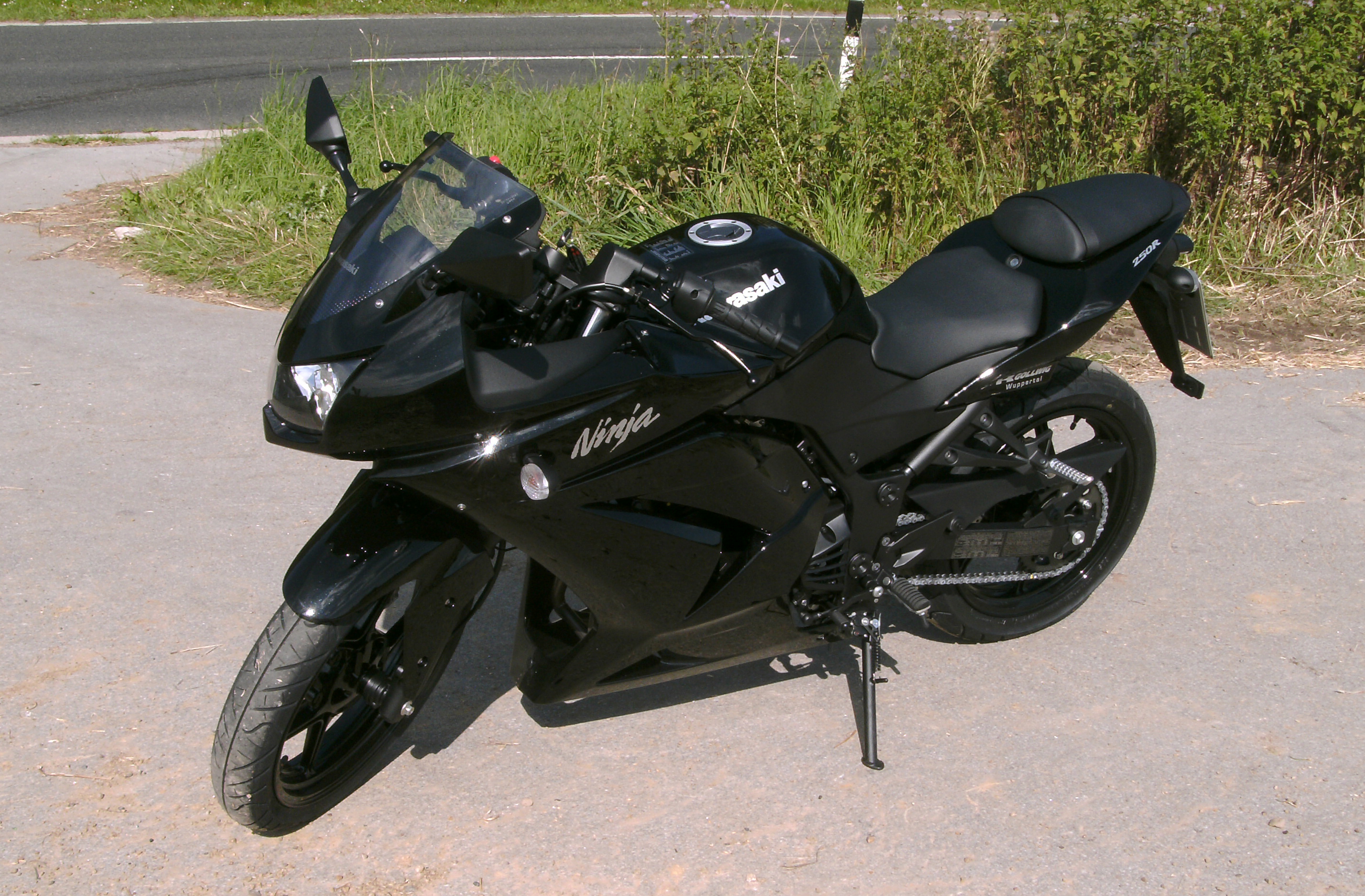 Kawasaki Ninja 250R in der Farbe Schwarz.